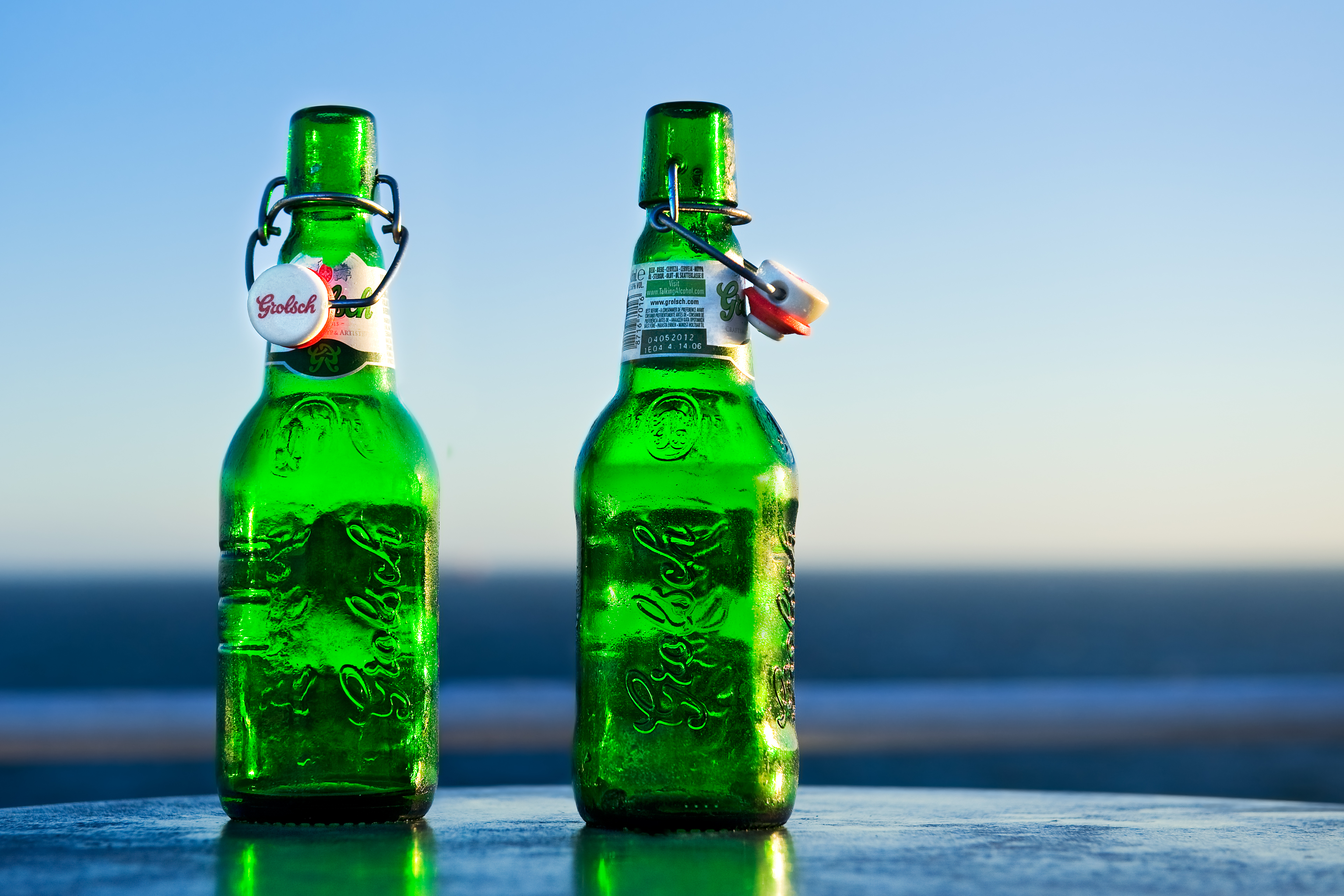 Bierflaschen mit Bügelverschluss der niederländischen Brauerei Grolsch.